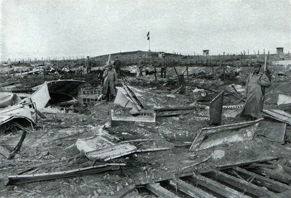 Zerstörte Barrikaden und Drahtverhaue des Forts Loncin der Festung Lüttich